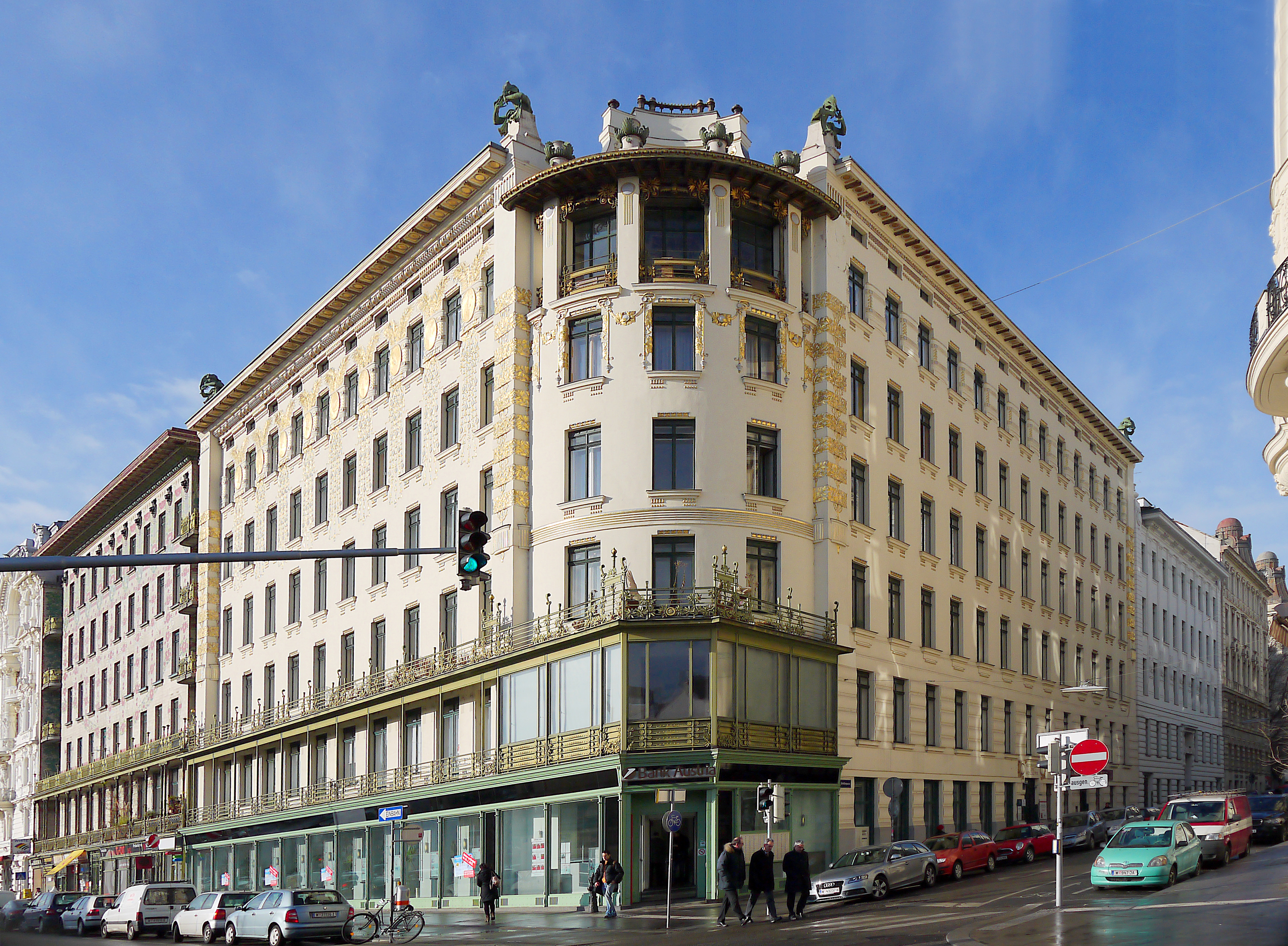 Wienzeilenhäuser Otto Wagner